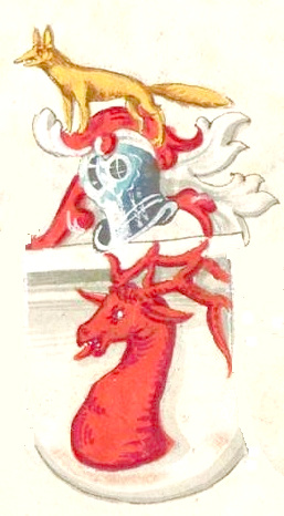 Wappen der Herren von Ainwil (Anwil, Anwyl) im Thurgau